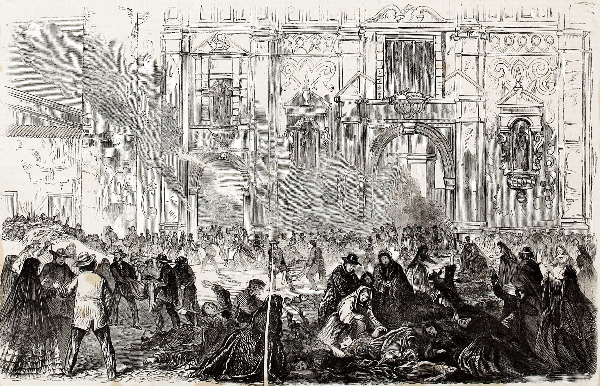 Imagen de "Frank Leslie's illustrated newspaper" del Incendio de la Iglesia de la Compañía en Santiago de Chile. "La búsqueda de los parientes. Dibujo de un residente estadounidense."